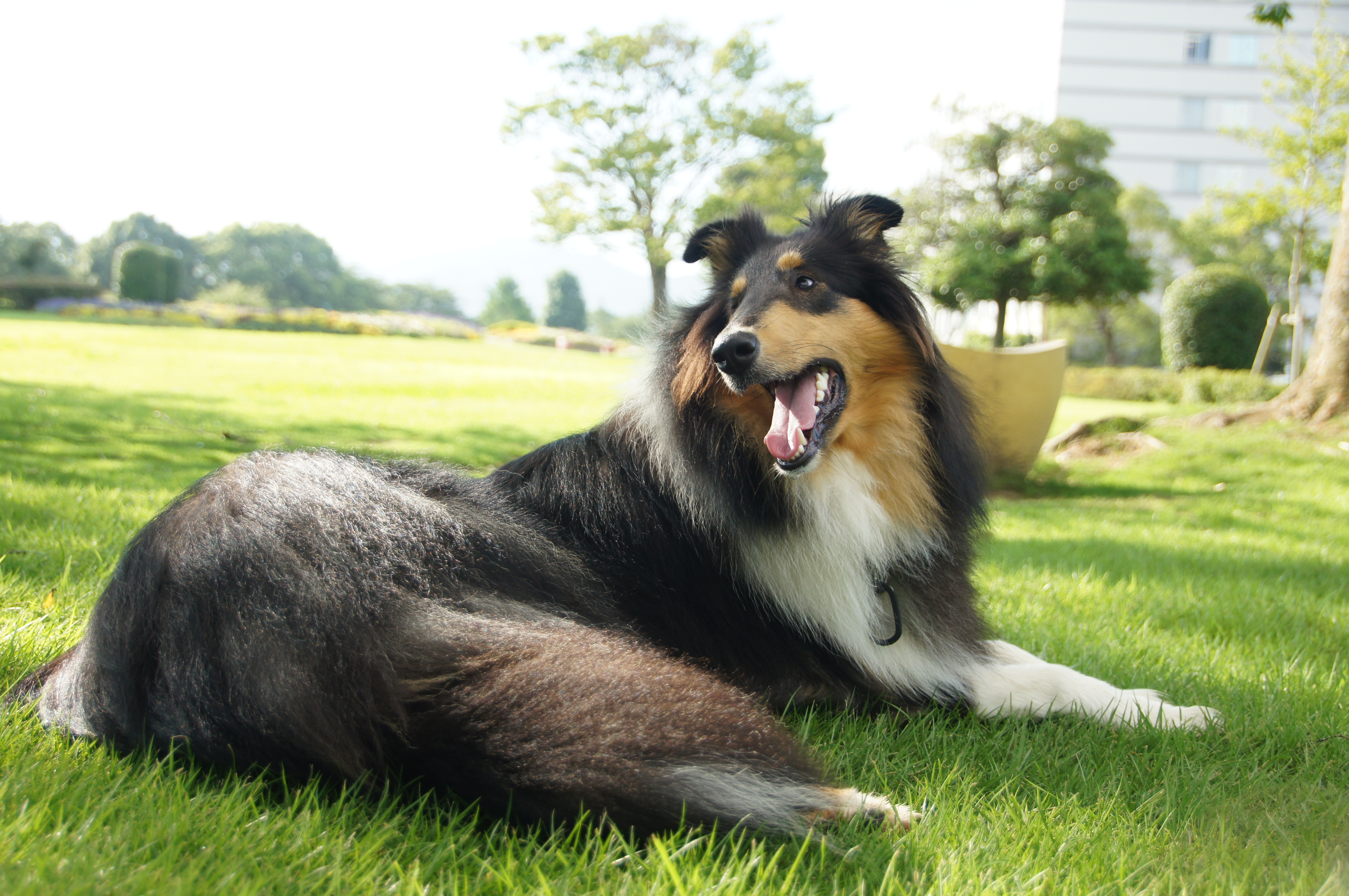 ラフ・コリー画像